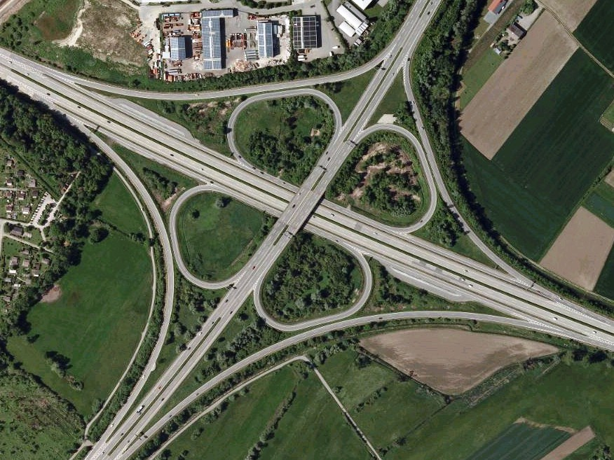 Luftaufnahme der Bayerischen Vermessungsverwaltung: Autobahnkreuz Deggendorf der BAB 92 und BAB 3